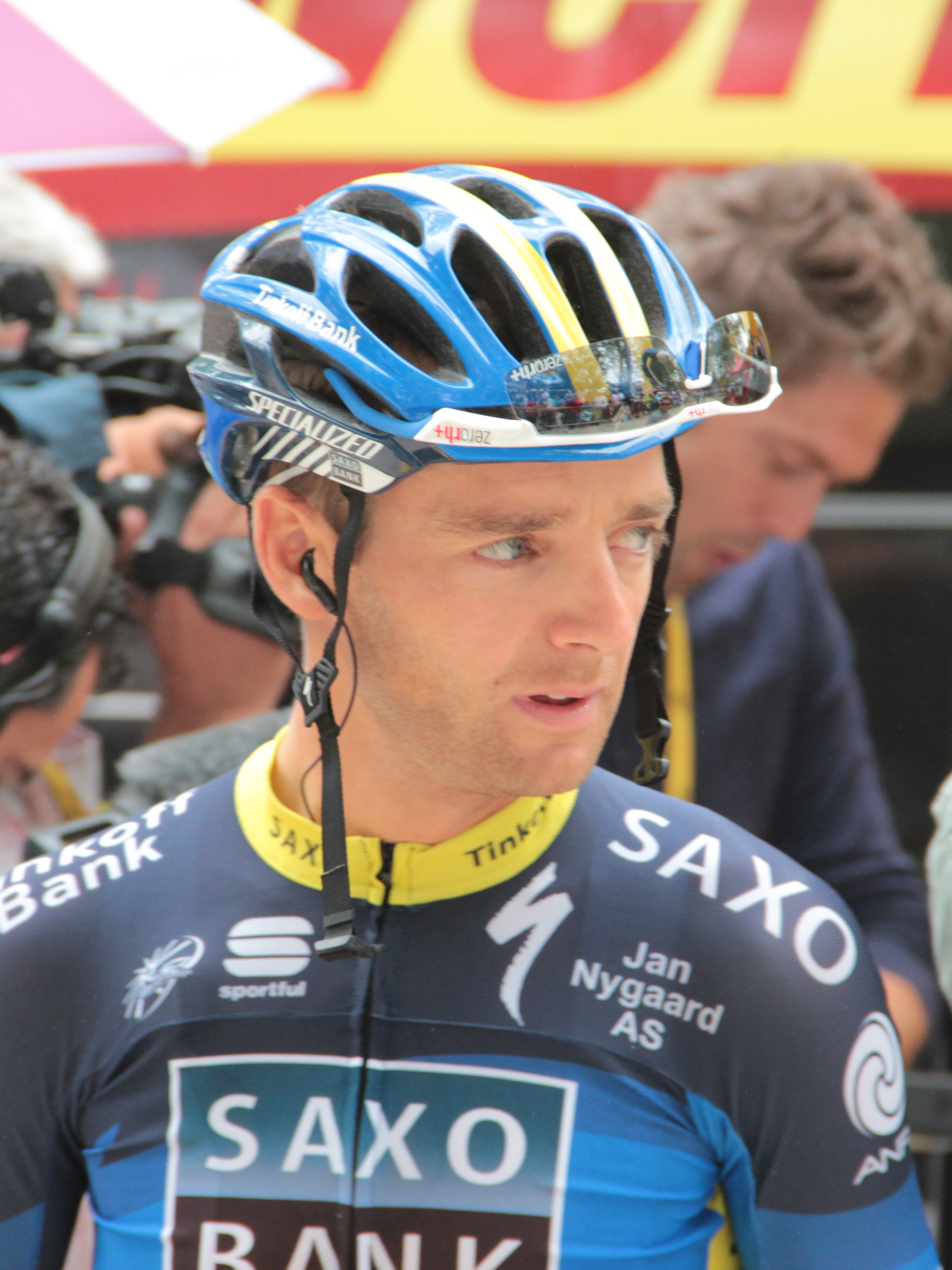 Karsten Kroon avant le départ de la 18e étape du Tour de France 2012.